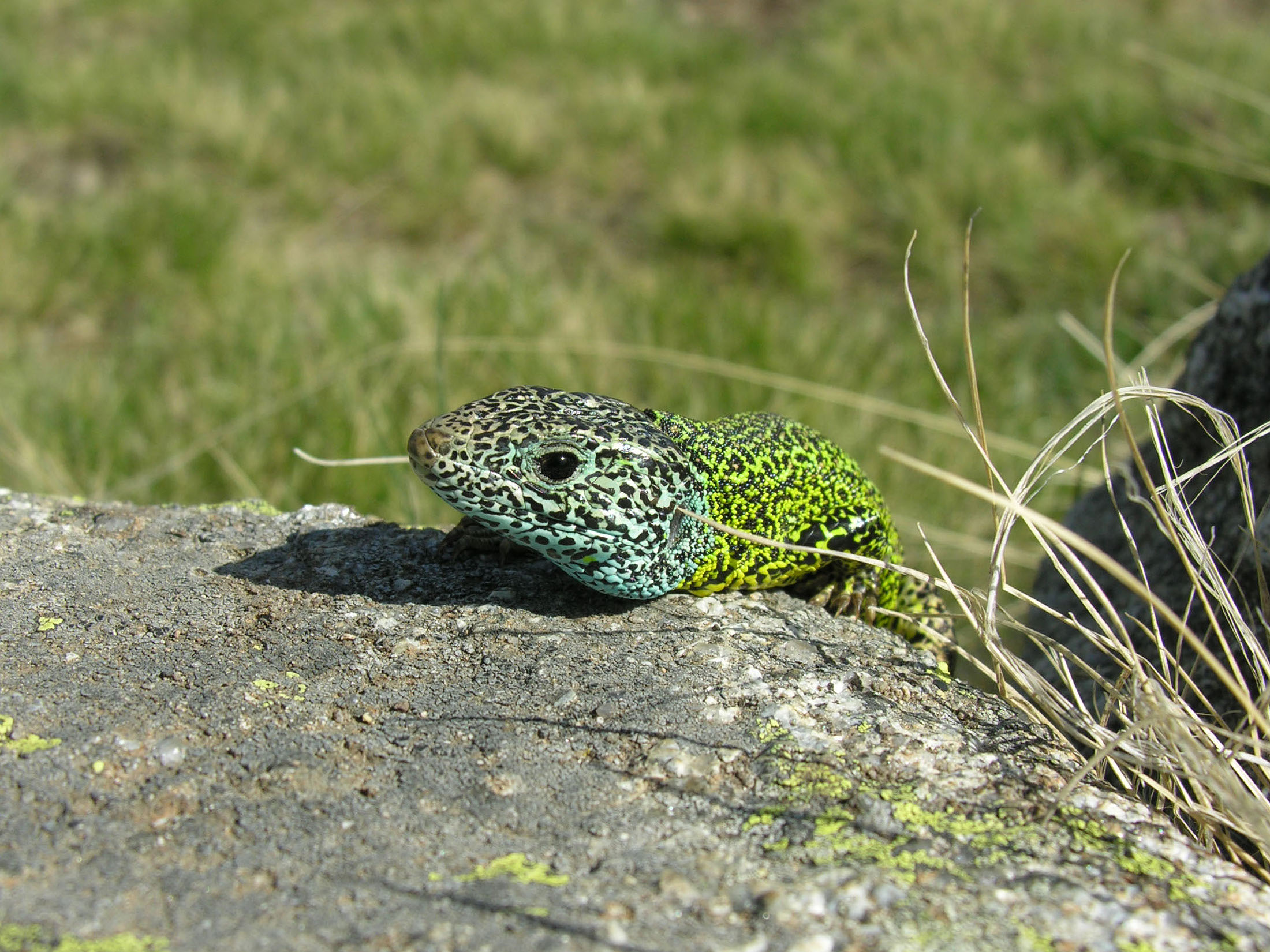 Lacerta schreiberi (Lacertidae). Gredos, Ávila, España.